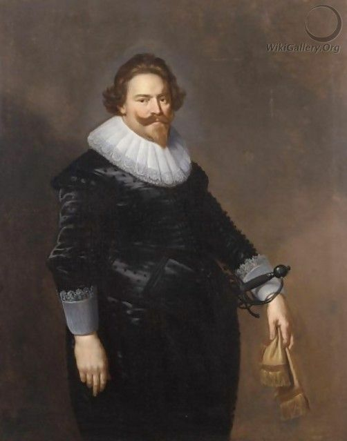 Paulus Moreelse: Ernst van Drakenstein